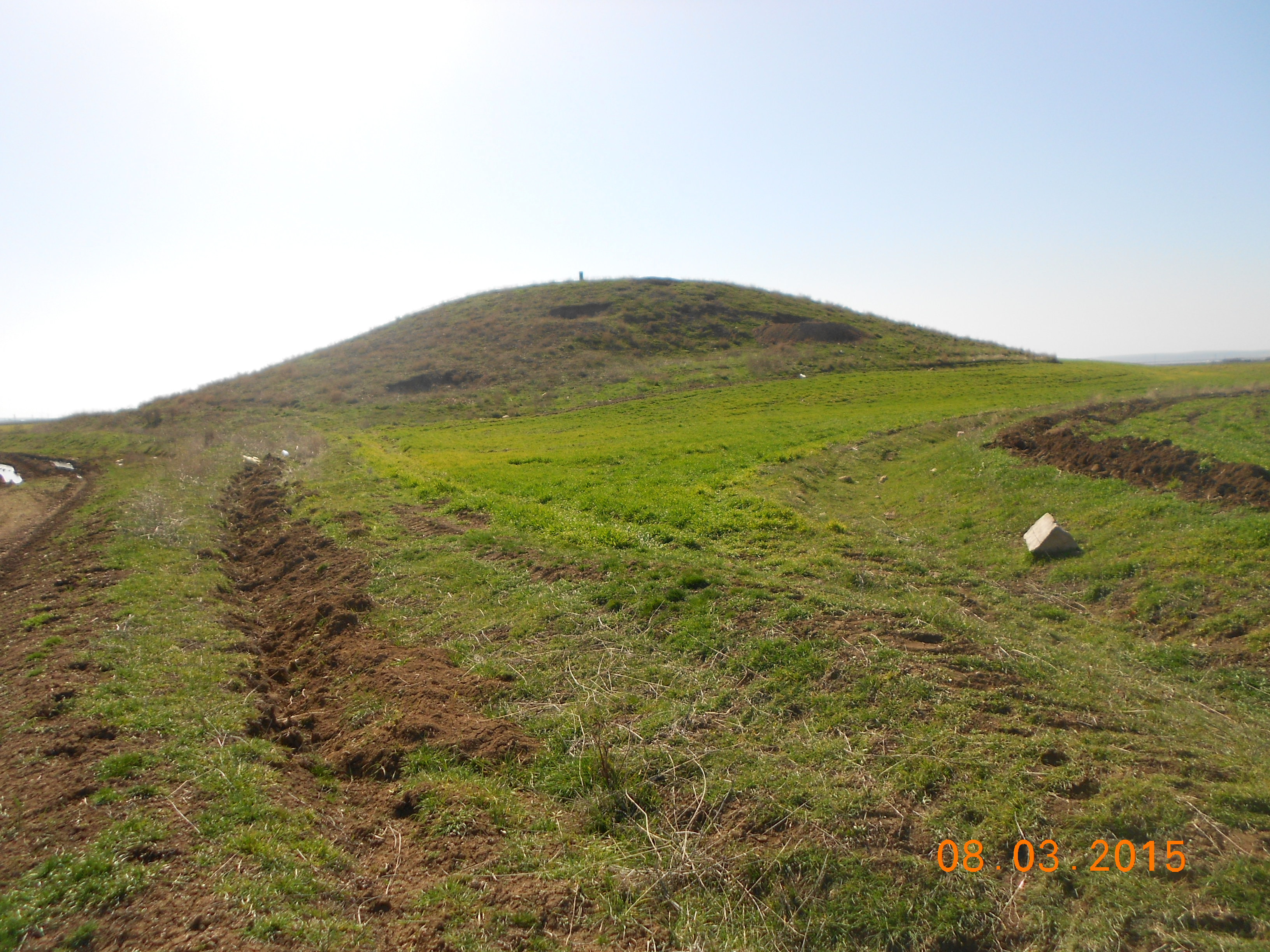 Hındıllı Höyüğü